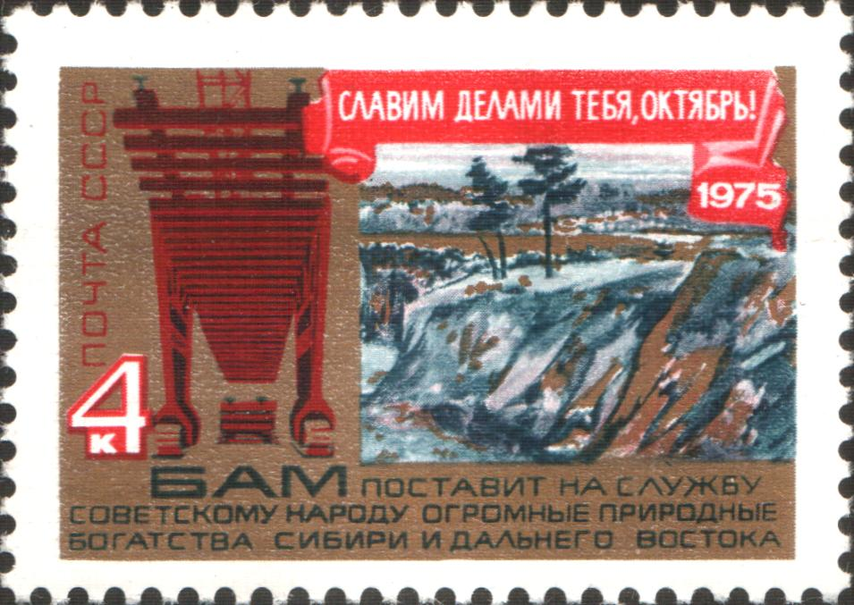 Почтовая марка СССР из серии «58-я годовщина Великой Октябрьской социалистической революции», выпущенная в октябре 1975 года. Марка посвящена строительству Байкало-Амурской железнодорожной магистрали. На марке изображены путеукладчик, сибирский ландшафт. Художник — Е. Анискин. Номер — 4517 (ЦФА). Тираж — 5,4 млн экз.